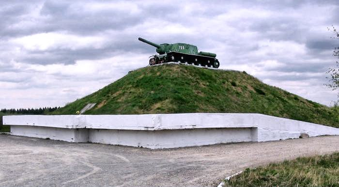 Памятник ИСУ-152 на высоте 260,4 в Скирманово, сельское поселение Волковское (Московская область). Надпись на табличке: «Здесь, на Скирмановских высотах, с 26 октября по 19 ноября 1941 г. войсками 16-й армии Западного фронта был разбит миф о непобедимости немецкой армии.»